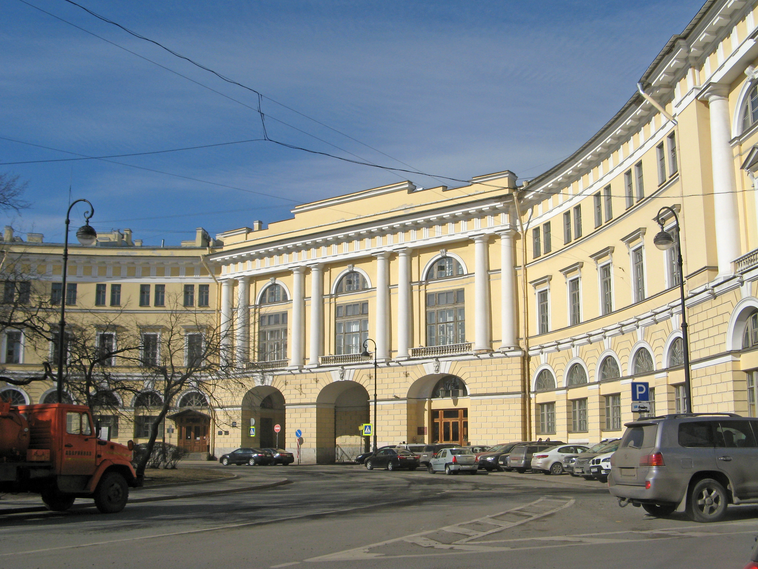 Министерство народного просвещения: улица Зодчего Росси, 1-3, площадь Островского, 11, площадь Ломоносова, 1, 2, Торговый переулок, 2, Центральный район, Санкт-Петербург